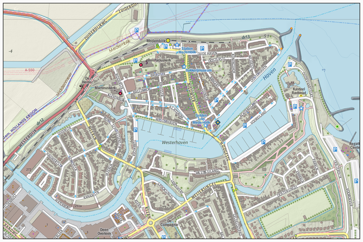 Topografische kaart van Medemblik (centrum van woonplaats). Resolutie: 800 pixels/km. Kaartbeeld samengesteld uit de open geodata van de Top10NL en Top25namen (Basisregistratie Topografie, Kadaster), Creative Commons BY licentie. Gebouwvlakken uit open geodata BAG extract. Wegen uit de OpenStreetMap. Reliëfschaduw uit de Actuele Hoogtekaart AHN2. Samenstelling en kleurenschema: Jan-Willem van Aalst, met QGIS2. Zie ook de Legenda.